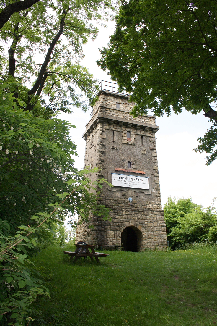 Ostseite der Tempelbergwarte auf 403m Höhe, östlich der Ortschaft Altenberg in der niederösterreichischen Marktgemeinde St. Andrä-Wördern.